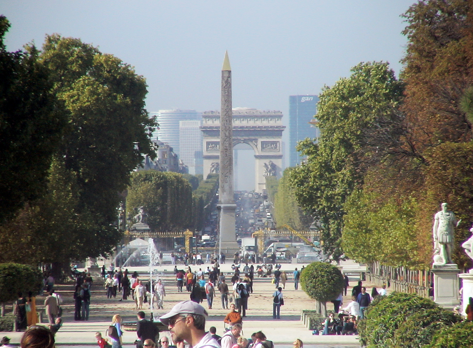 Axe Place Concorde, Arc de Triomphe, La Defense, Paris.